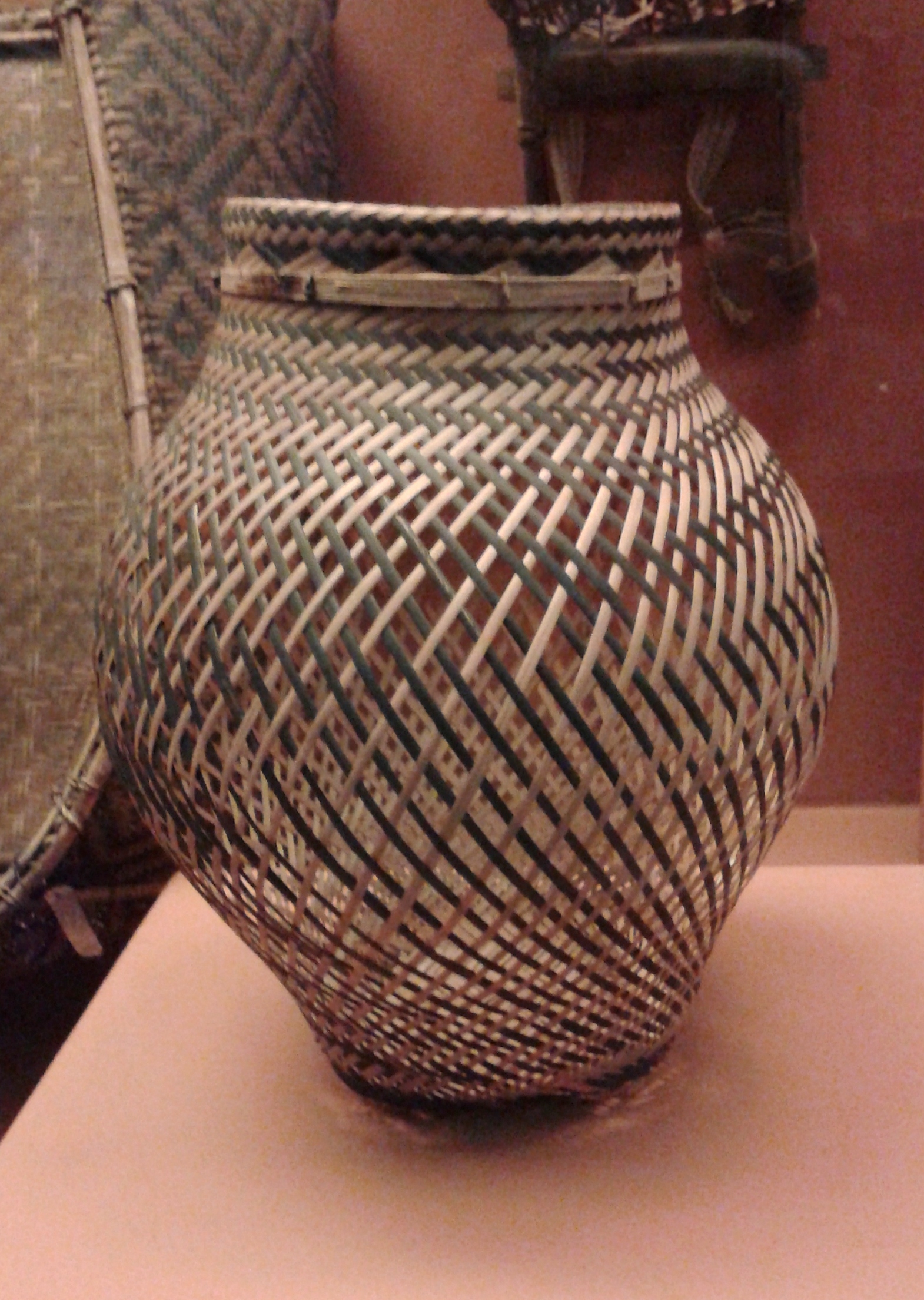 Português do Brasil: Cesto - Tariana/Rio Uaupés, 1978. Acervo de etnologia indígena brasileira do Museu Nacional/UFRJ, Rio de Janeiro, Brasil.